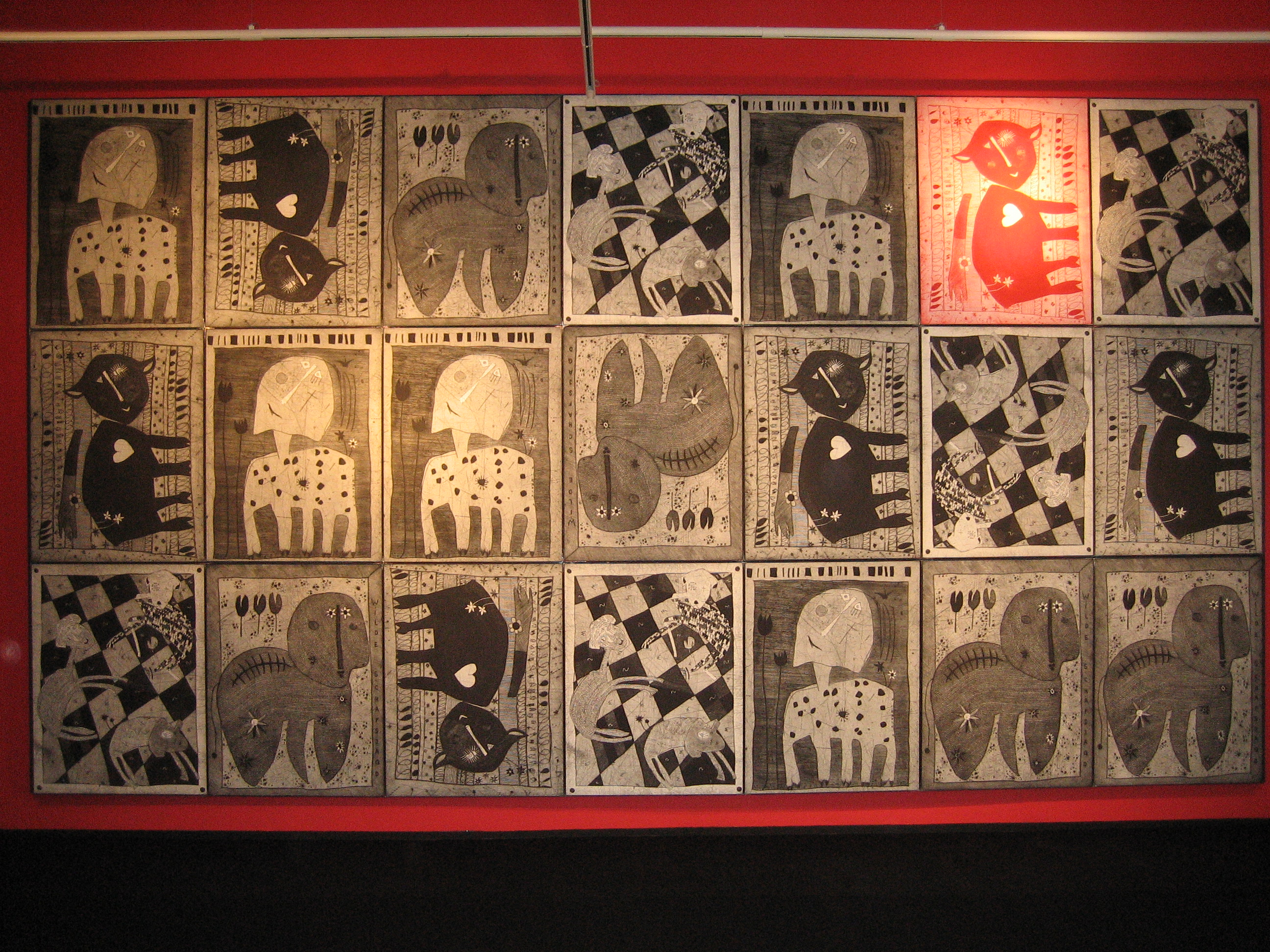 Wilde Schafsjagd, Installation aus 21 Kaltnadelradierungen, 3,75x6,95, 2005